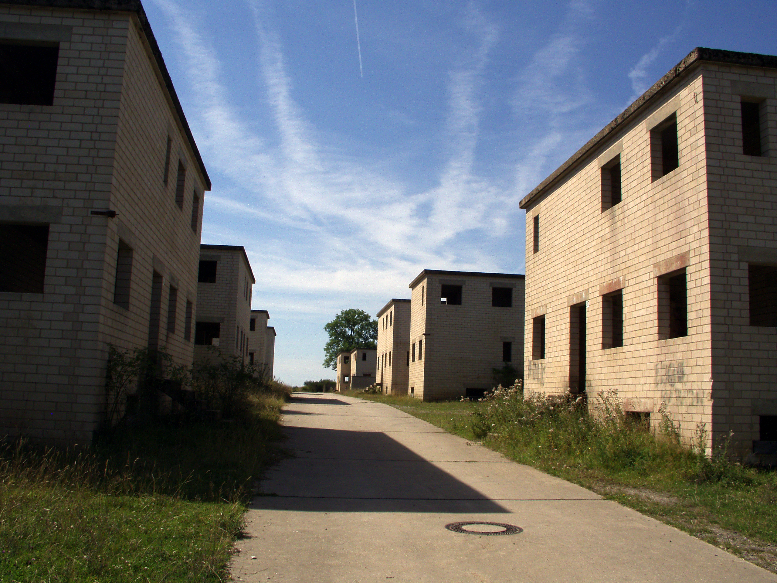 Ein kleiner Straßenzug als Übungsgelände für den Häuserkampf